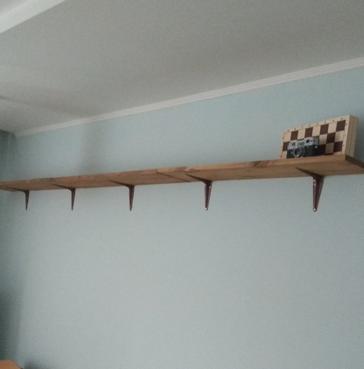 Полка из досок, леруа, кронштейн